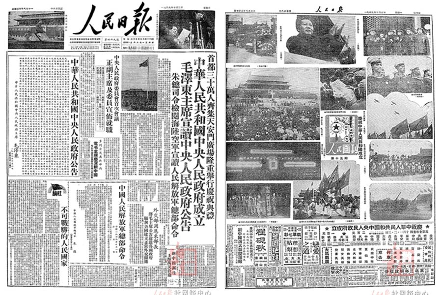 中文（中国大陆）: 1949年10月2日《人民日报》第一版和最后一版